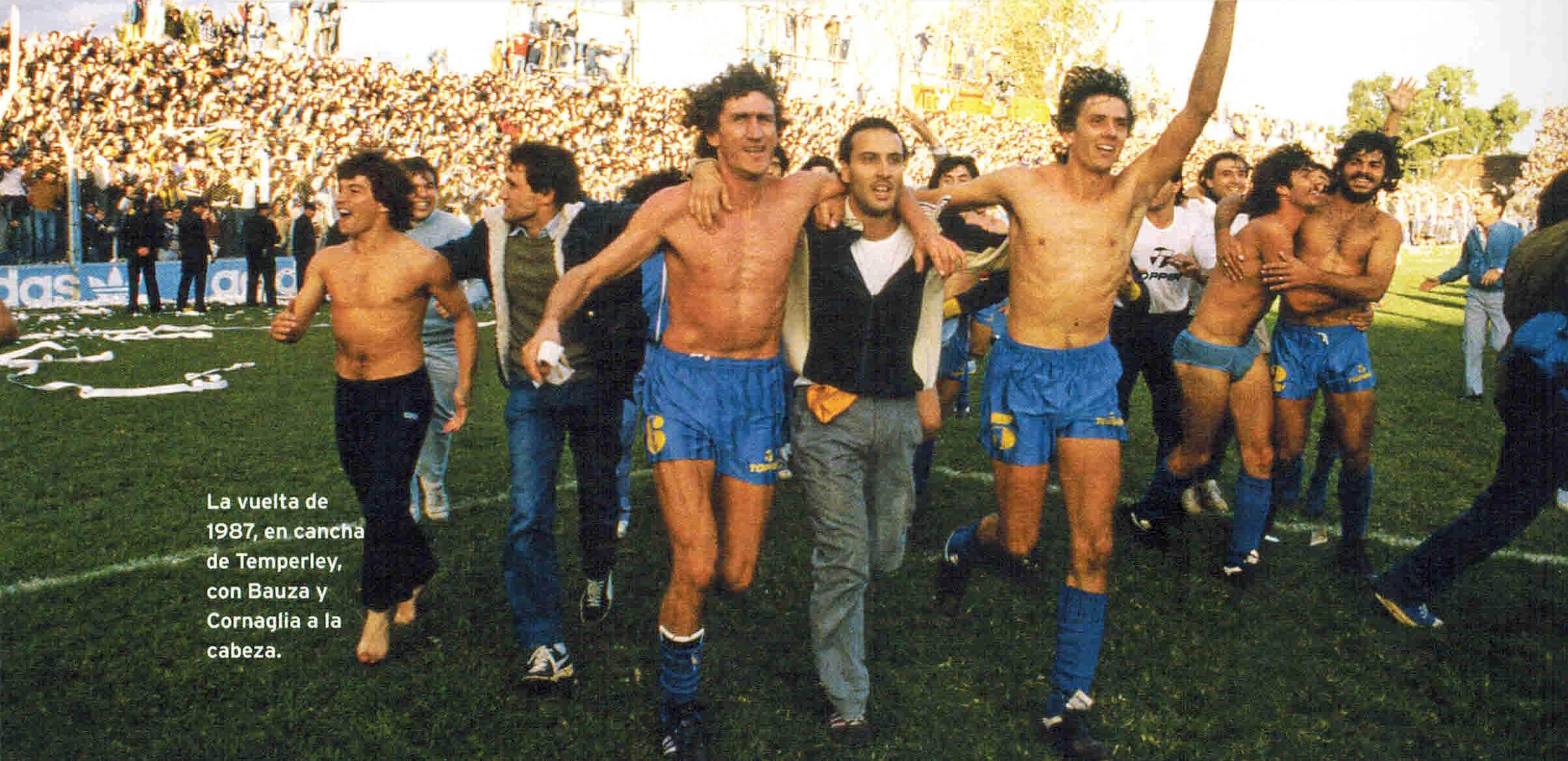 Bauza y Cornaglia, de Rosario Central, dando la vuelta olímpica en cancha de Témplerley